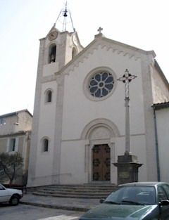 photo perso concernant la commune de Vacquières (Hérault, France) - église Saint-Baudile